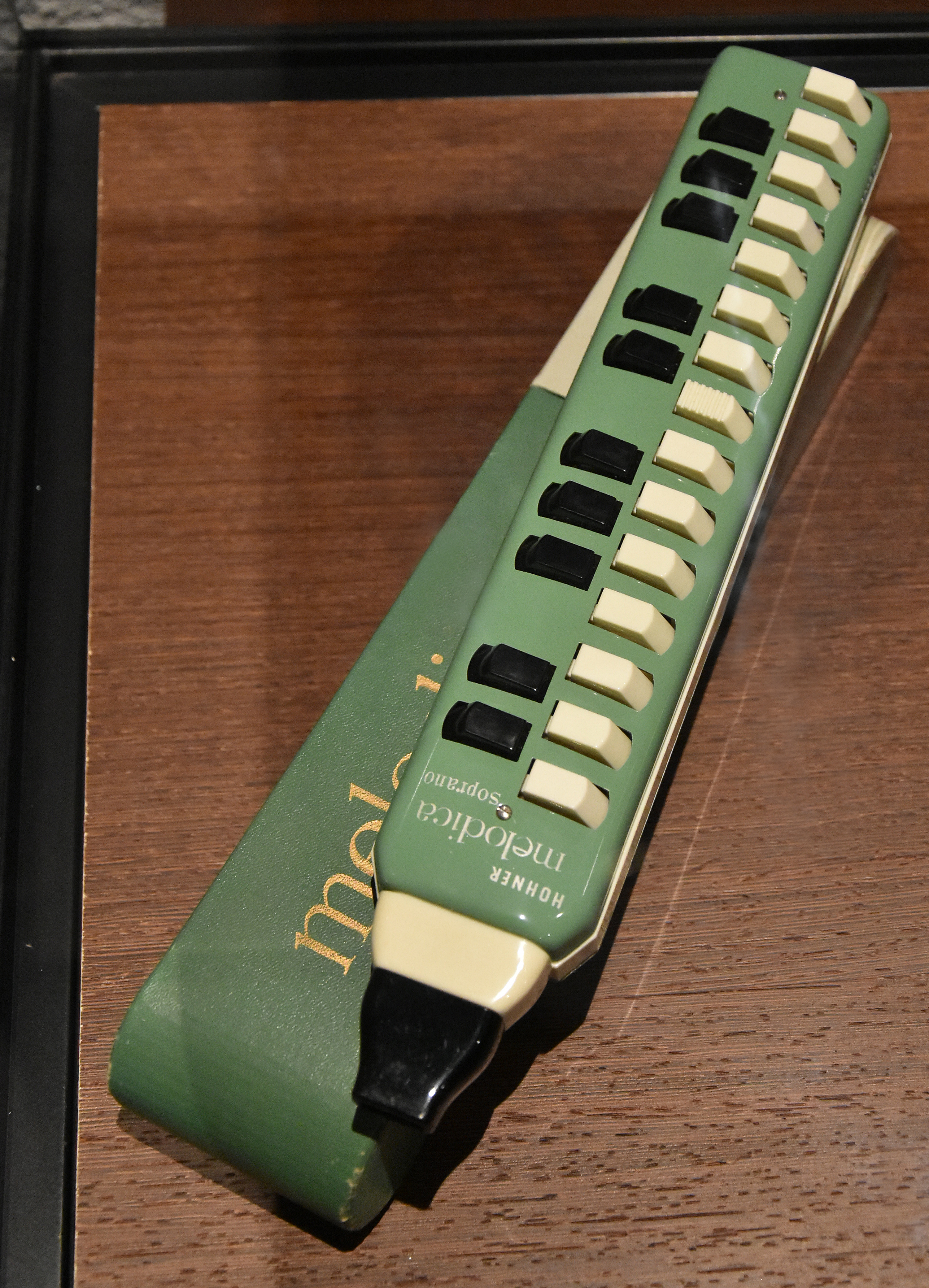 Hohner melodica soprano MiM 29-01-2019